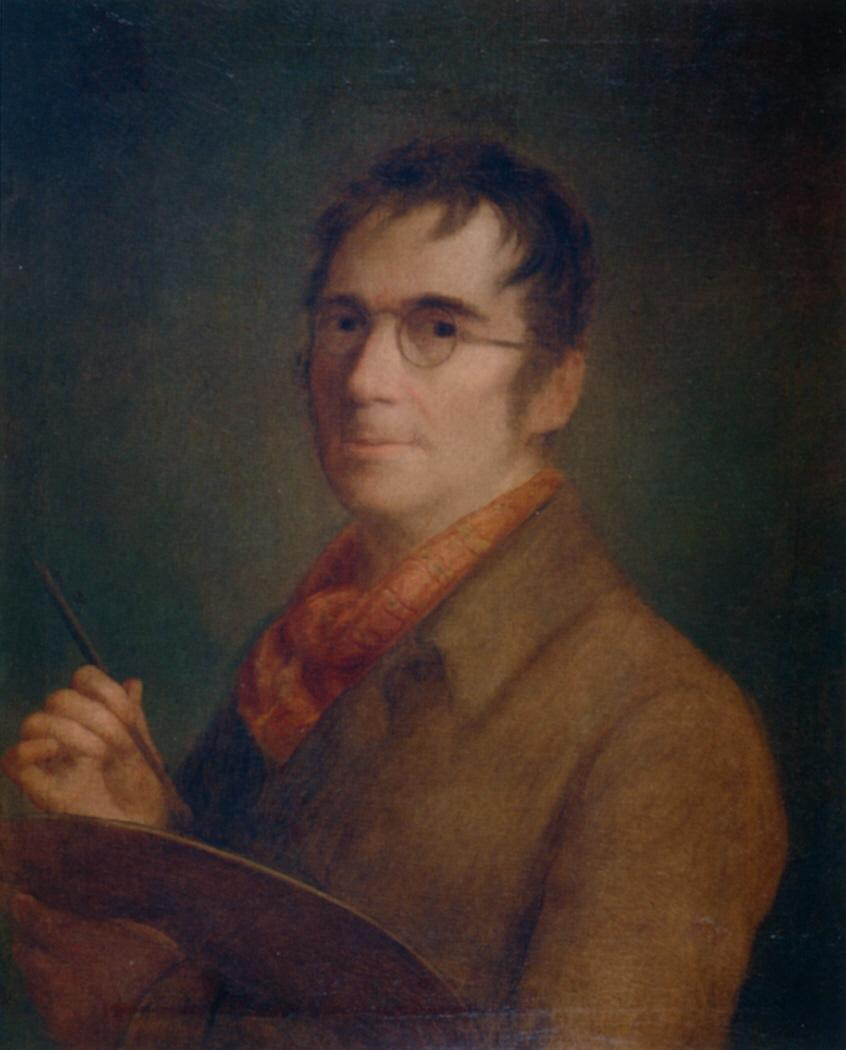 La mayoría de los autores consideran, aunque no hay pruebas definitivas que lo avalen, que esta obra es un autorretrato del pintor Agustín Esteve.